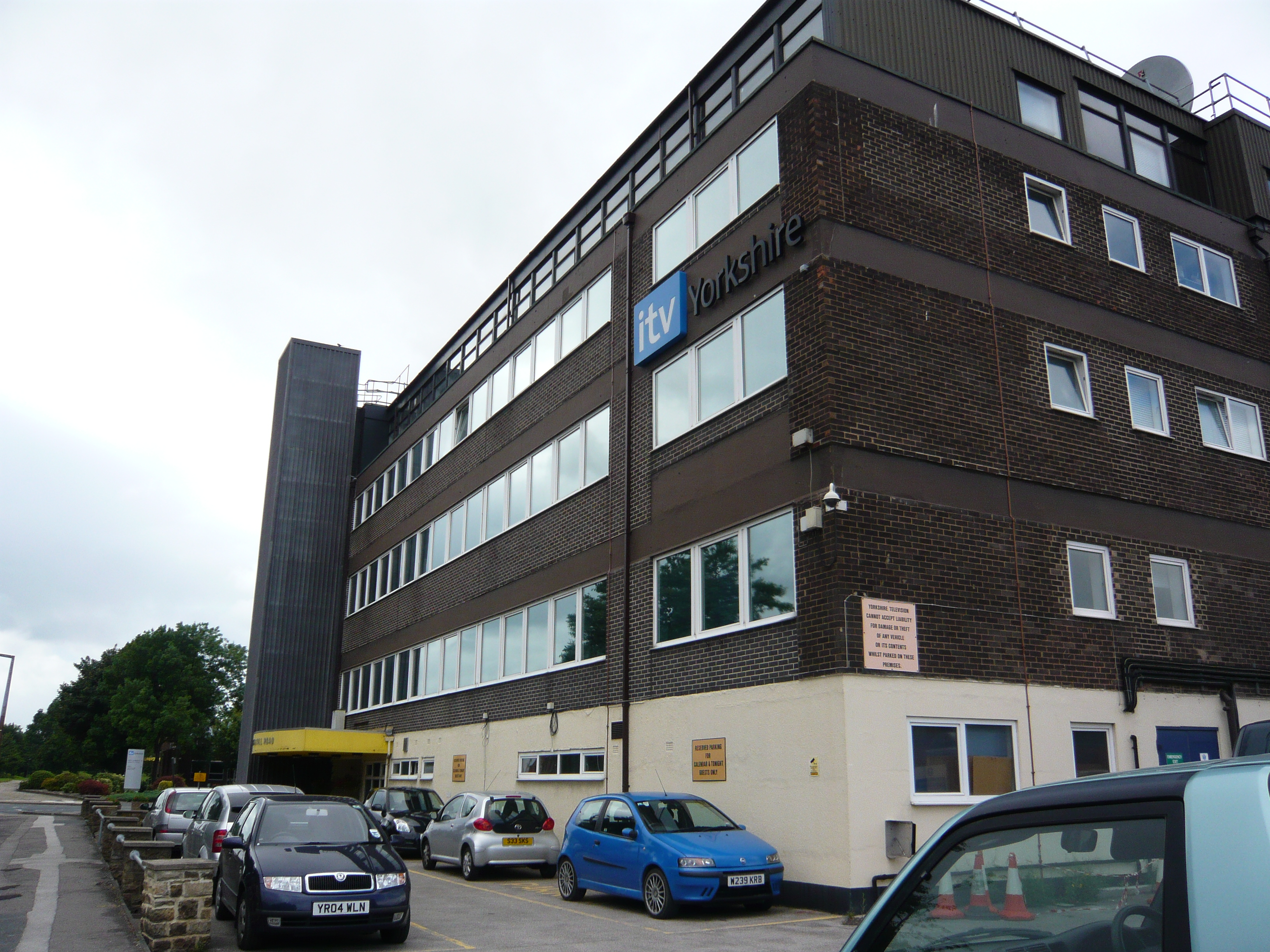 Calendar studios, Kirkstall Road, Leeds